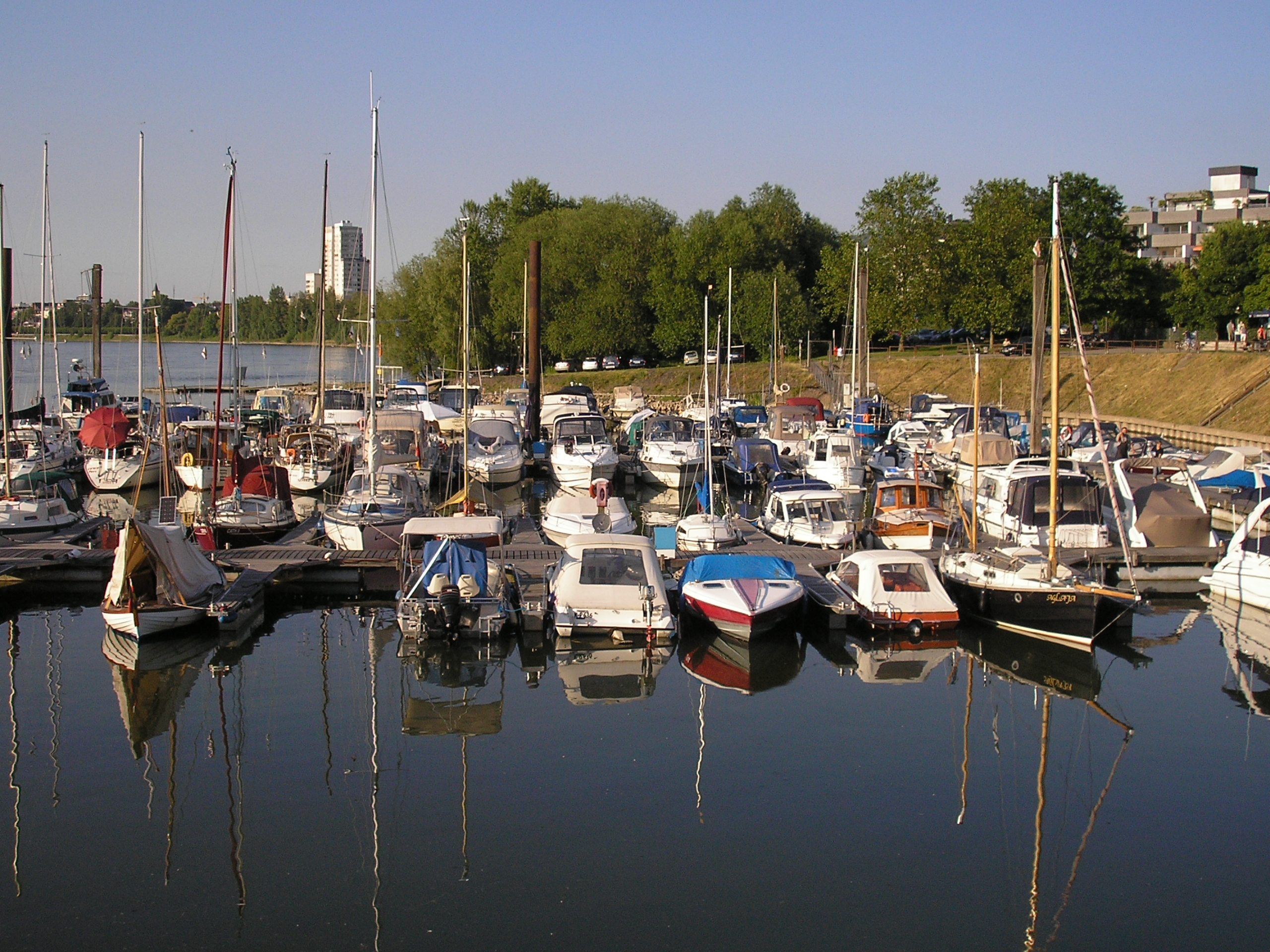 Yachthafen an der Groov in Köln-Zündorf. Blick auf Köln-Porz.